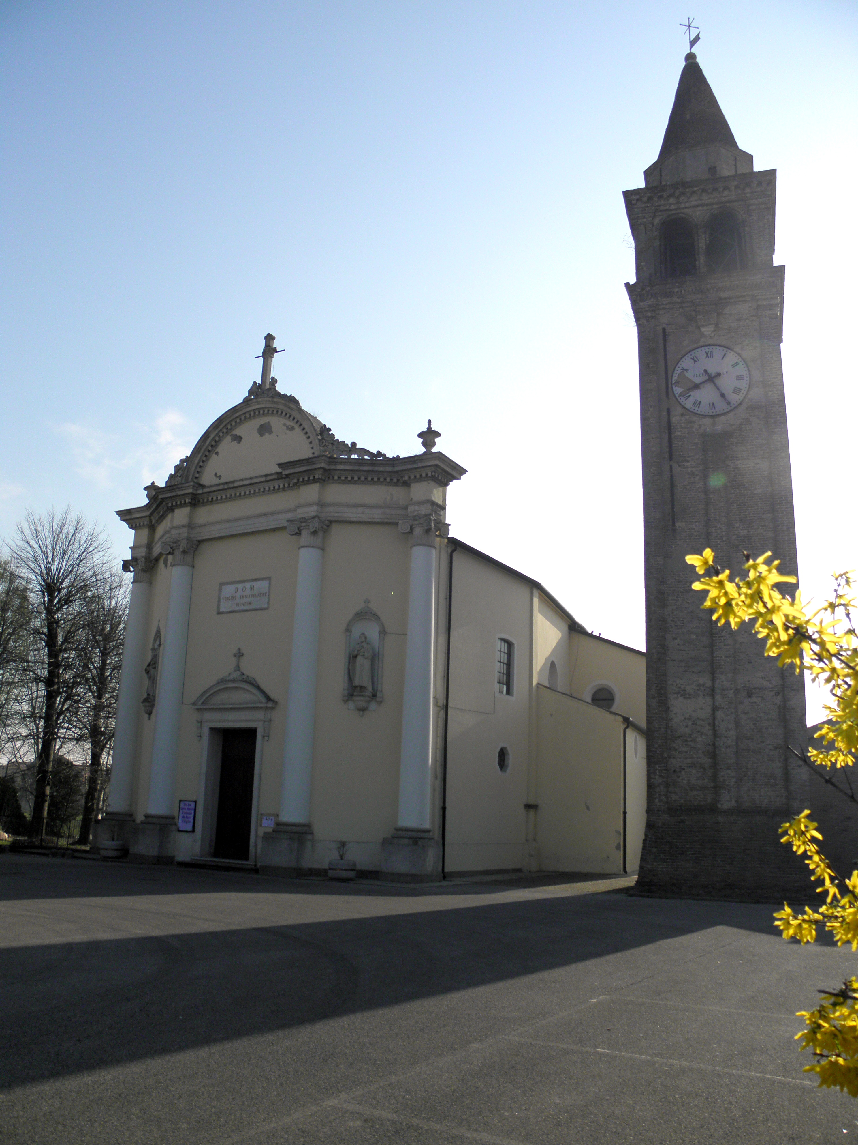 Cona: la chiesa parrocchiale della Beata Vergine Maria Immacolata.